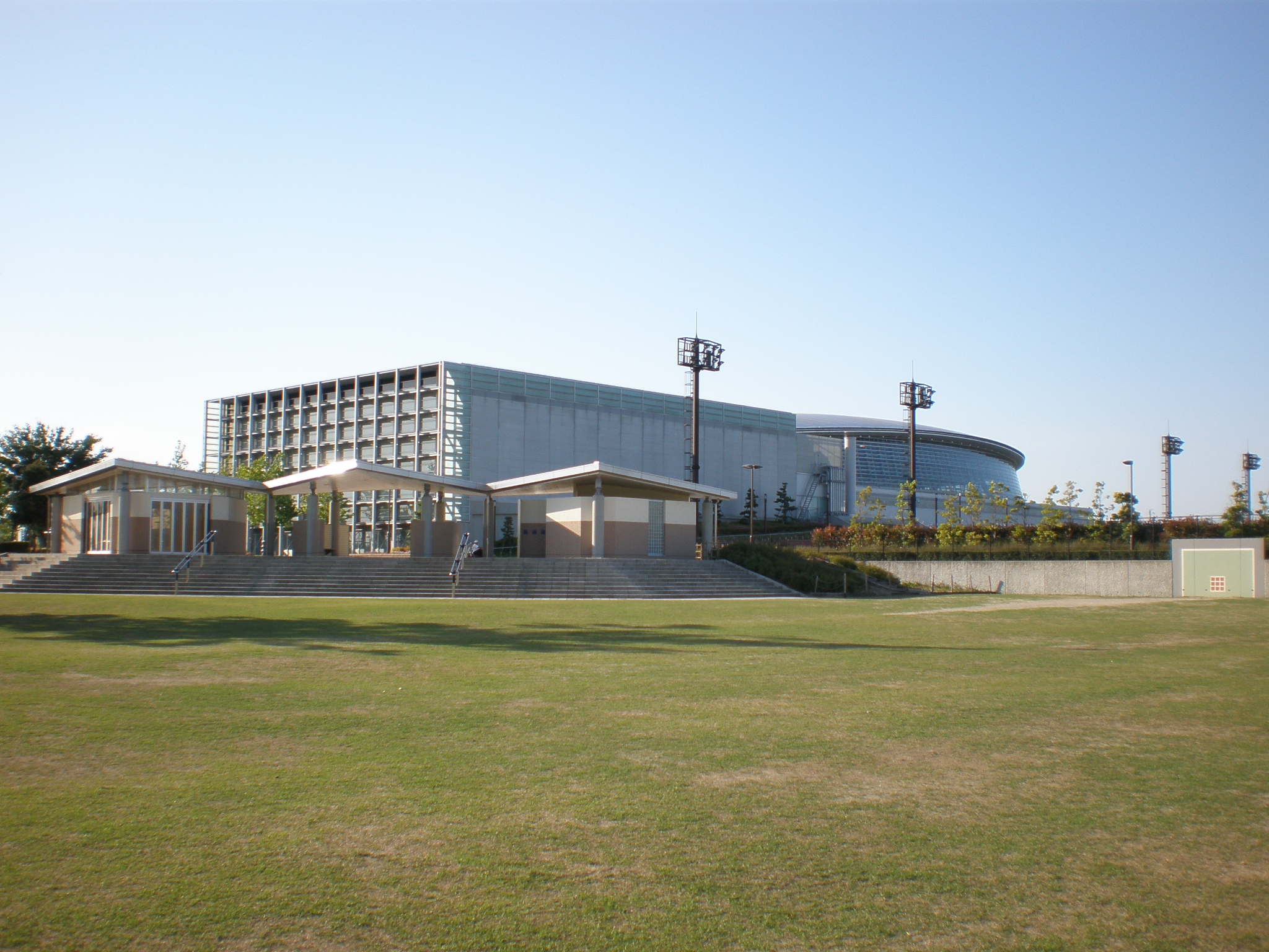 愛知県小牧市にある小牧市スポーツ公園